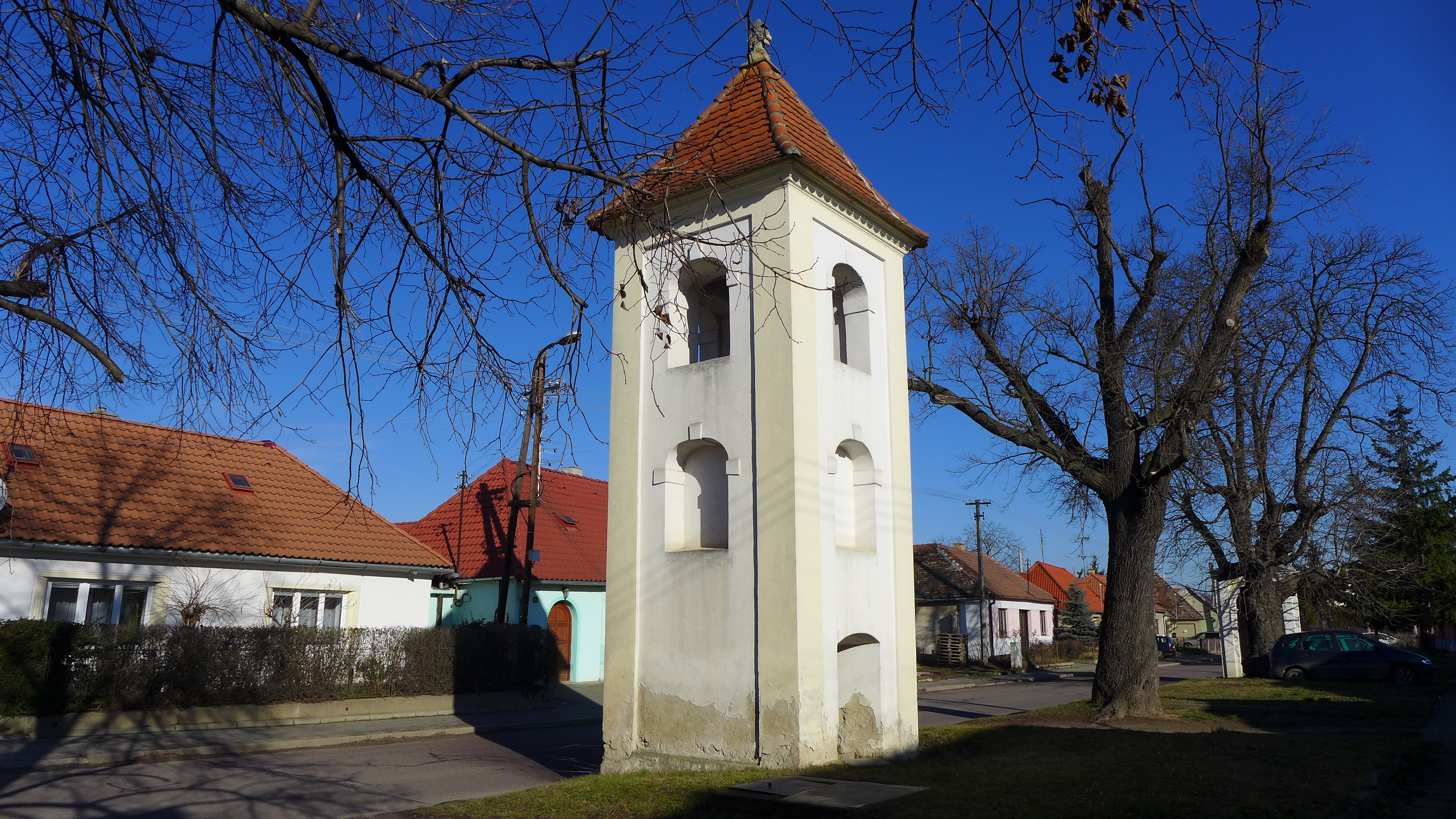 Zvonička, proti čp. 72, parc. 299/3, Oblekovice.